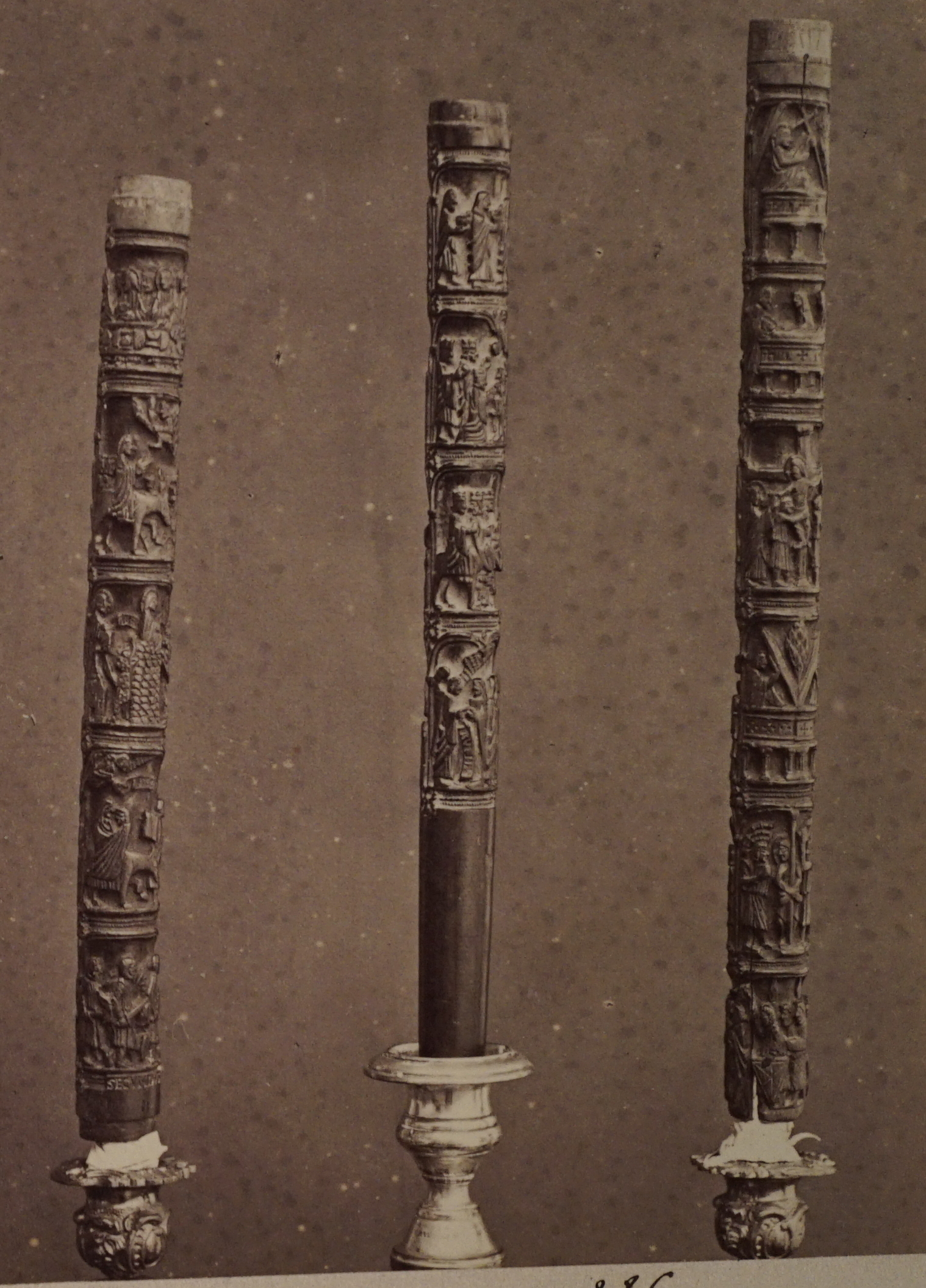 image du bâton de Gibrien.